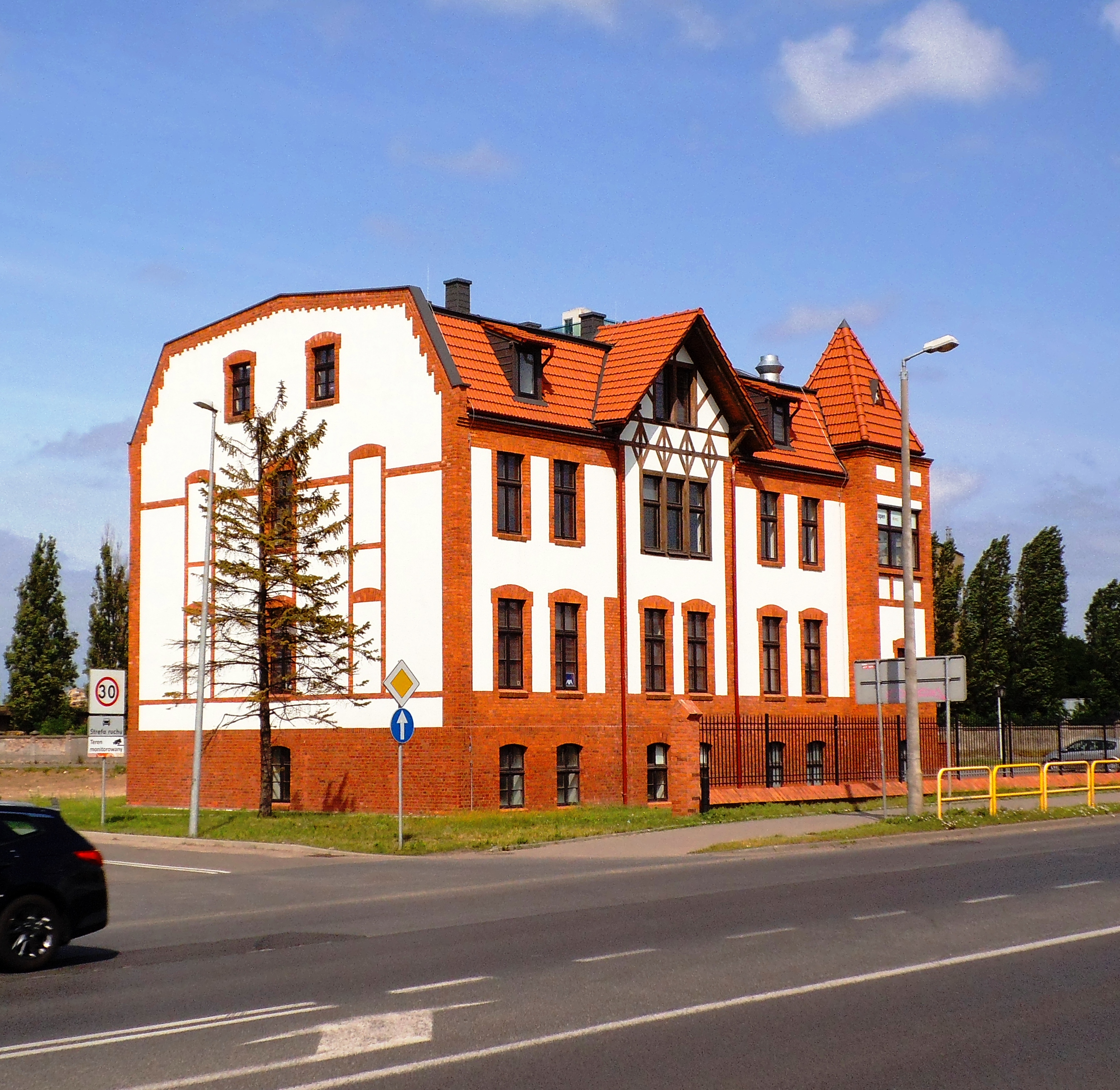 Budynek przy ul. Żółkiewskiego 31 w Toruniu1